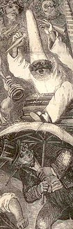 Détail d'une illustration du Carnaval de Rome